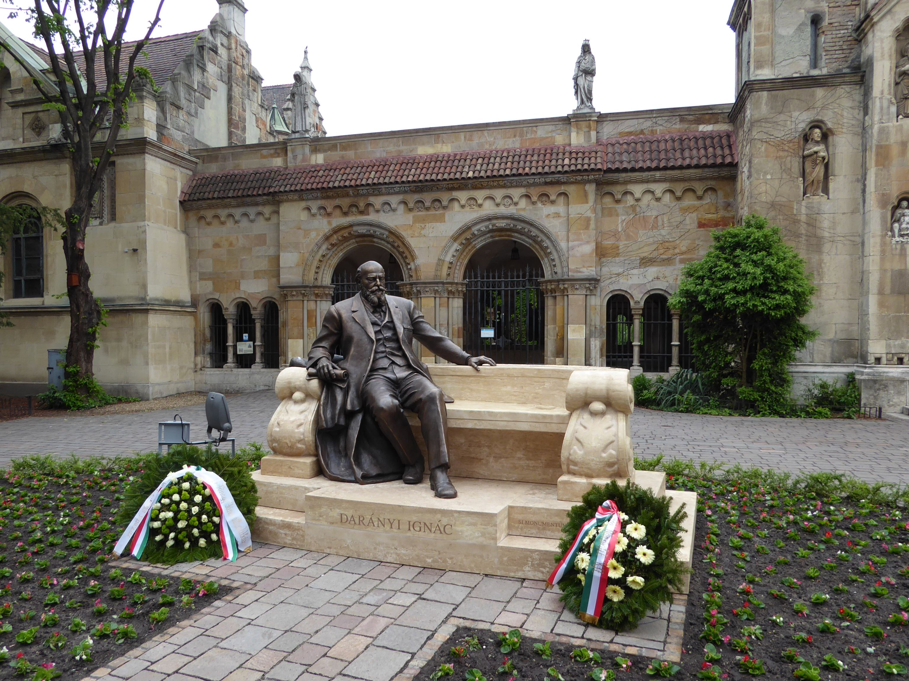 Darányi Ignác politikus (1849–1927) ülő alakos fém szobra (2017, Kisfaludi Strobl Zsigmond, ifj. Györfi Sándor) Budapesten, a Városligetben, a Mezőgazdasági Múzeum előtt, a Károlyi szoborral szemben. A kő padra le lehet ülni mellé, így remek hely az arra járóknak fényképezkedésre. A második világháborúban megsemmisült szobor mintájára készült, 2017-ben állították. Felirata a talapzaton „Darányi Ignác” és „Si monumentum quaeris, circumspice!“. A fényképet 2017-04-28-n készítettem.